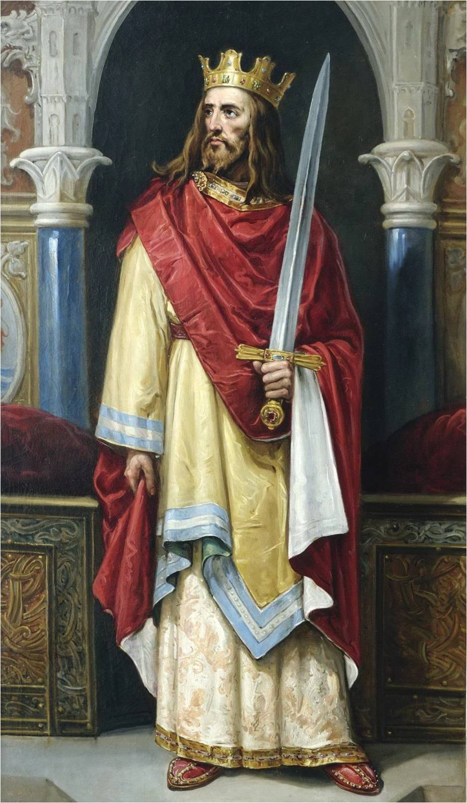 Retrato imaginario del rey Juan II de Castilla (1405-1454). Fue hijo del rey Enrique III de Castilla y de la reina Catalina de Lancáster. En 1431 el ejército castellano, comandado por el condestable Álvaro de Luna, derrotó a los musulmanes en la batalla de la Higueruela. En 1453 el condestable y valido Álvaro de Luna fue ejecutado por orden de Juan II en Valladolid. Y el rey Juan II falleció en Valladolid en 1454, a los 49 años de edad y fue sucedido en el trono por su hijo, Enrique IV de Castilla. Fue sepultado junto con su segunda esposa, la reina Isabel de Portugal, en la Cartuja de Miraflores.